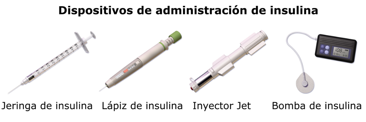 Dispositivos de administración de insulina. Ver animación completa de este tema médico.